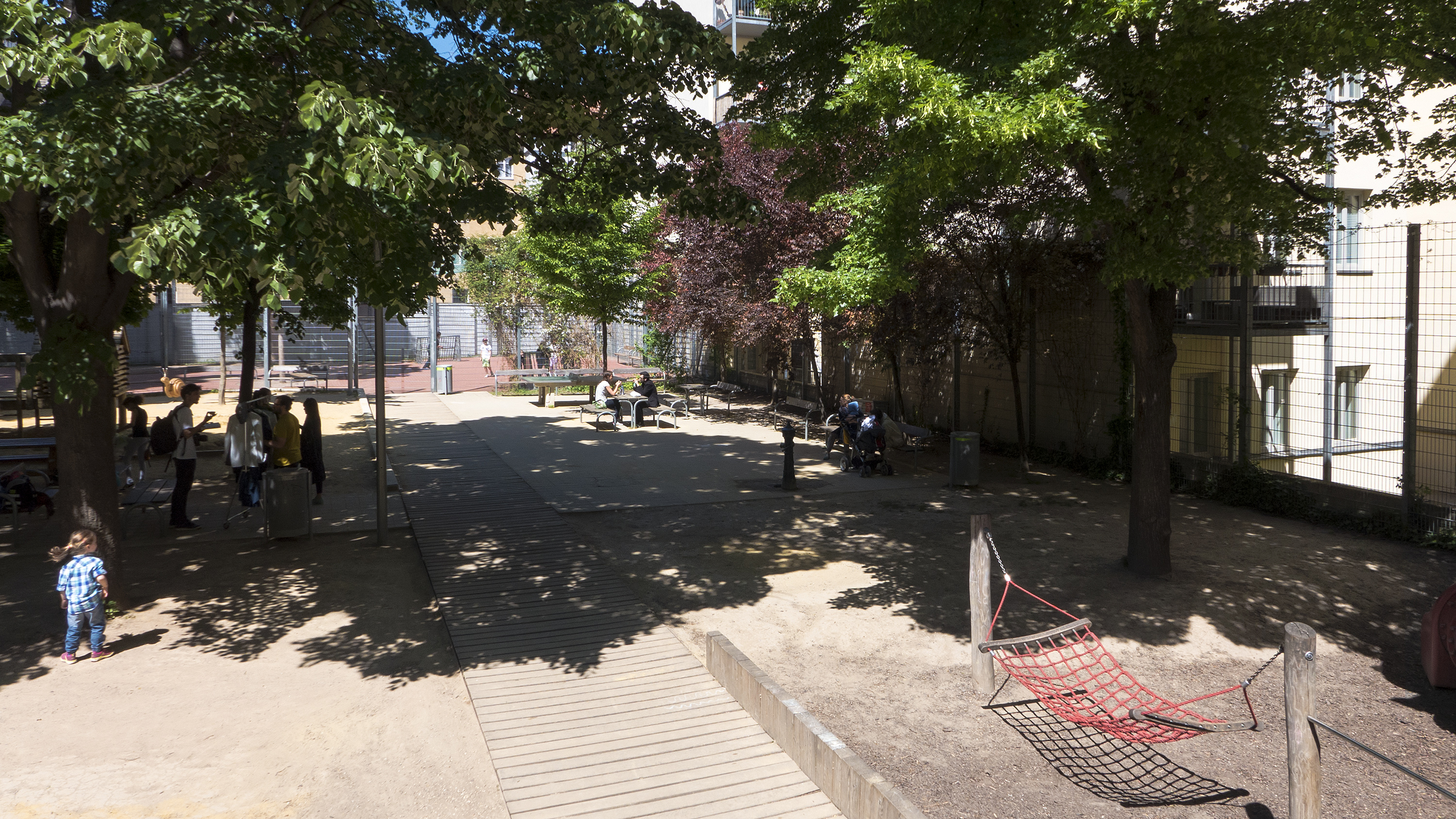 Karl-Farkas-Park in Wien 7